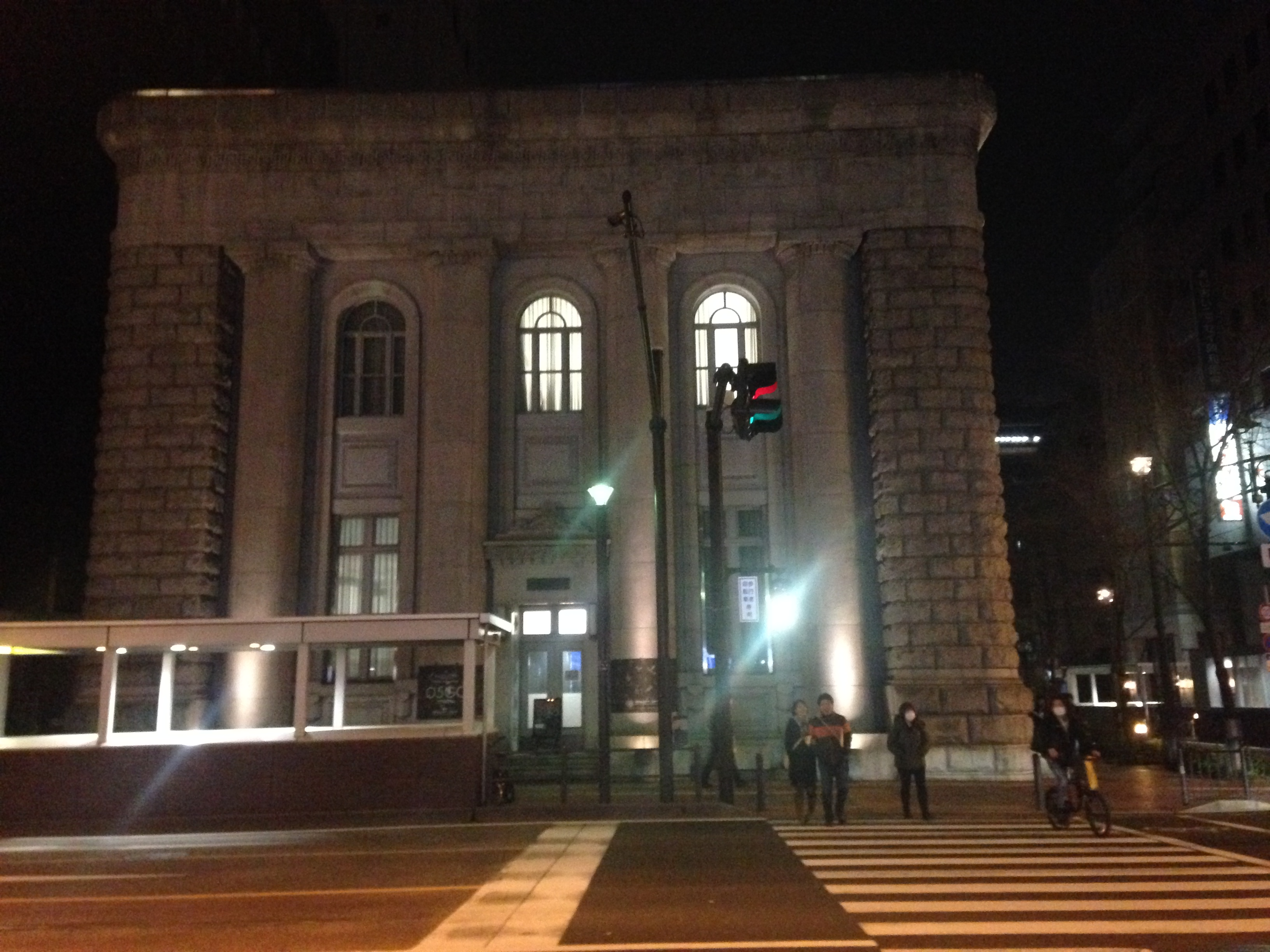 旧富士銀行横浜支店、現東京芸術大学映像研究科。手前左側の低い建物は馬車道駅の出口